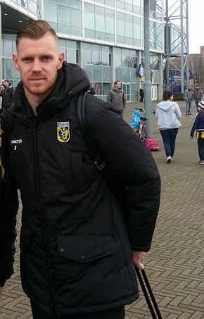 Maikel van der Werff